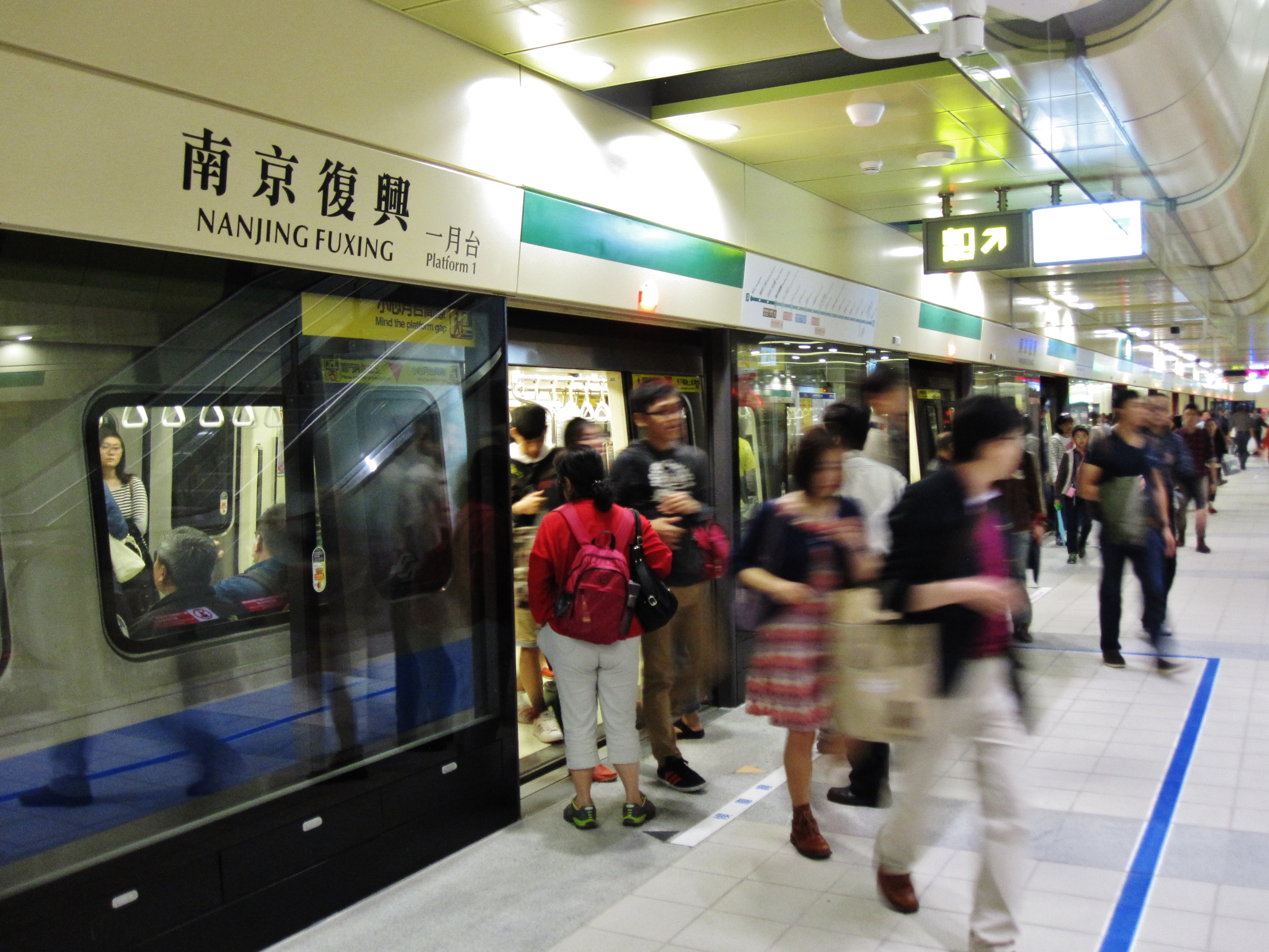 中文（台灣）: 捷運松山線南京復興站一月台